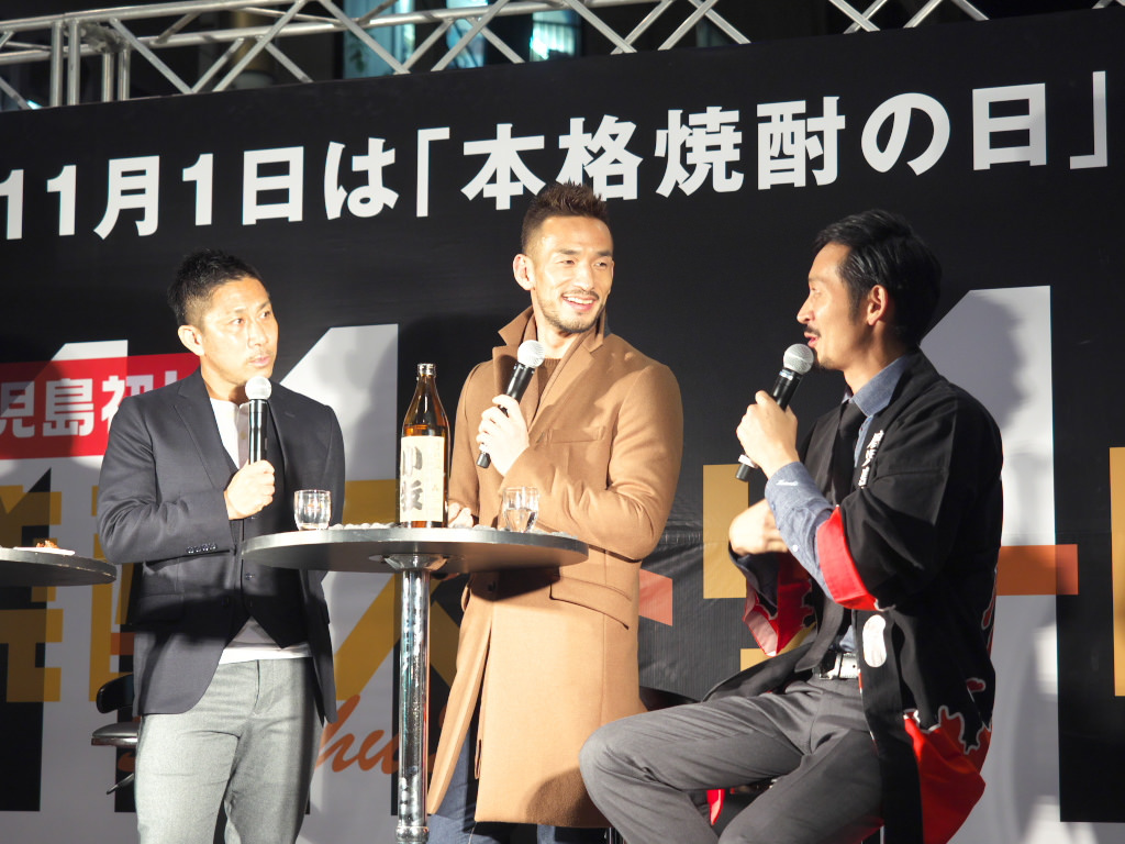 11月1・2・3日に開催しました「焼酎ストリート2016」の様子です。 11月1・2・3日に開催しました「焼酎ストリート2016」の様子です。